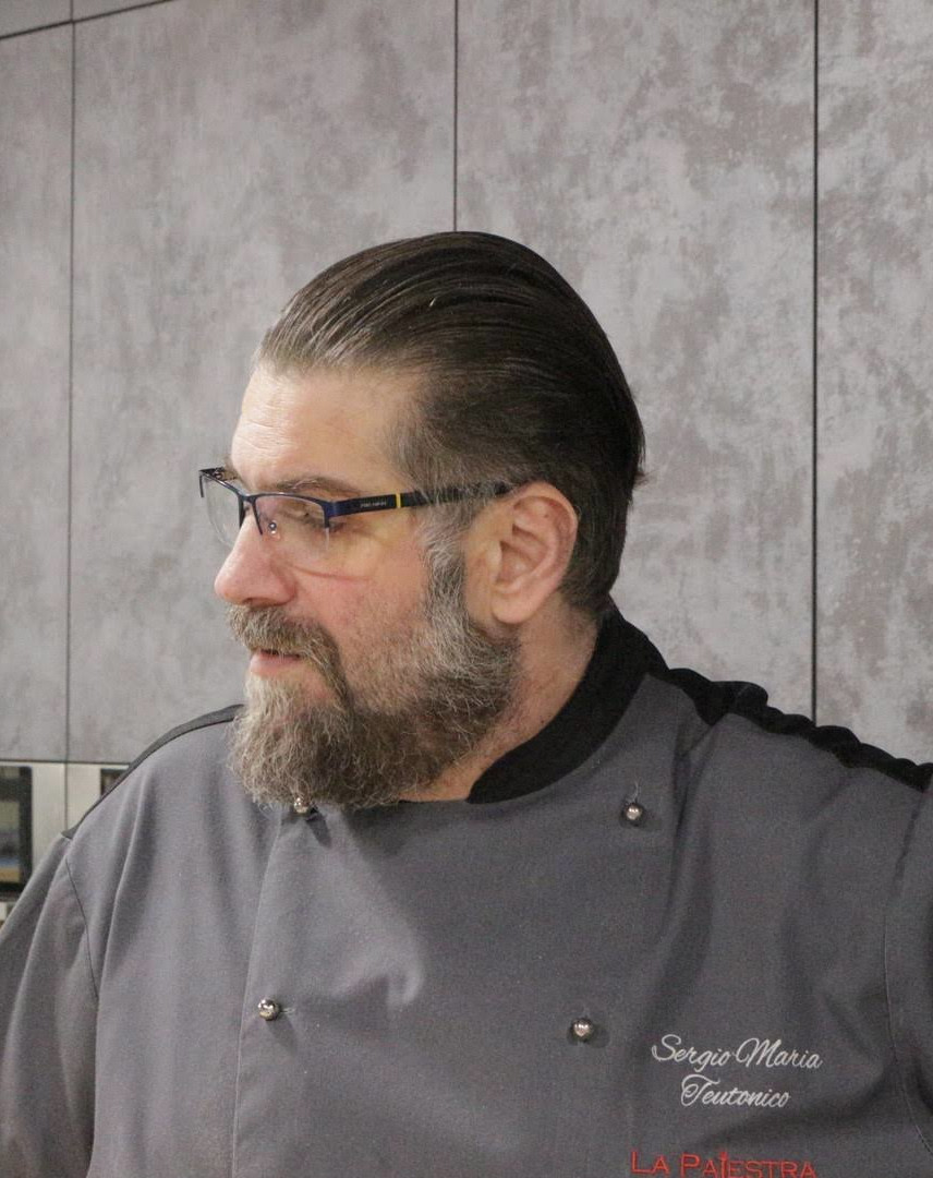 chef sergio maria teutonico durante una sua lezione di cucina